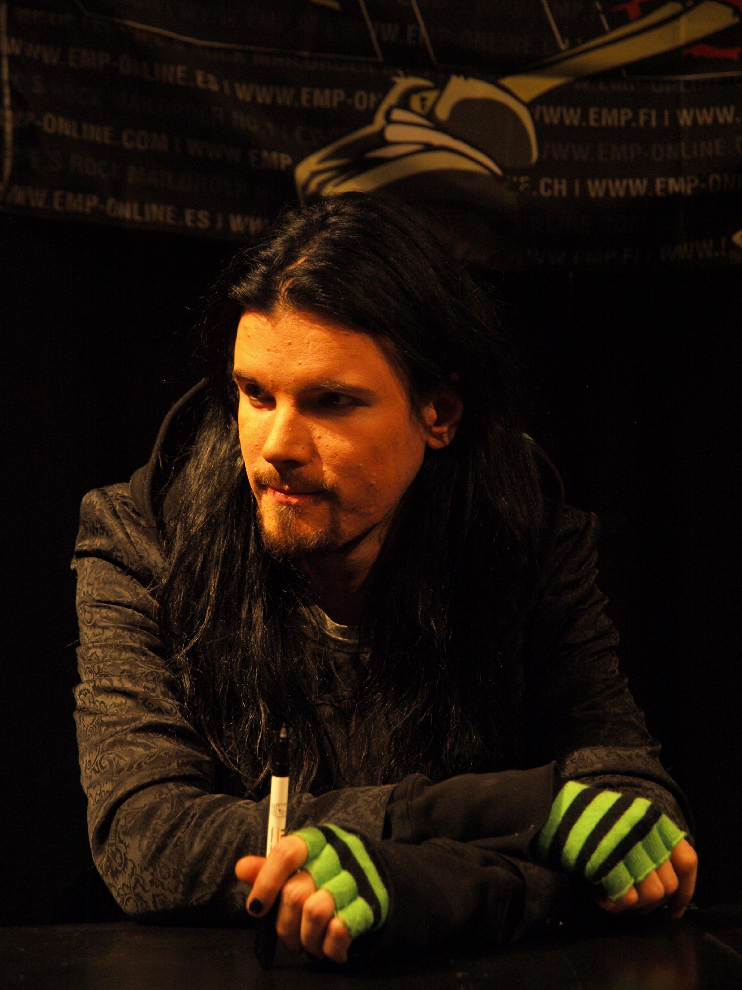 Perttu Kivilaakso at Helsinki Metal Meeting 2010